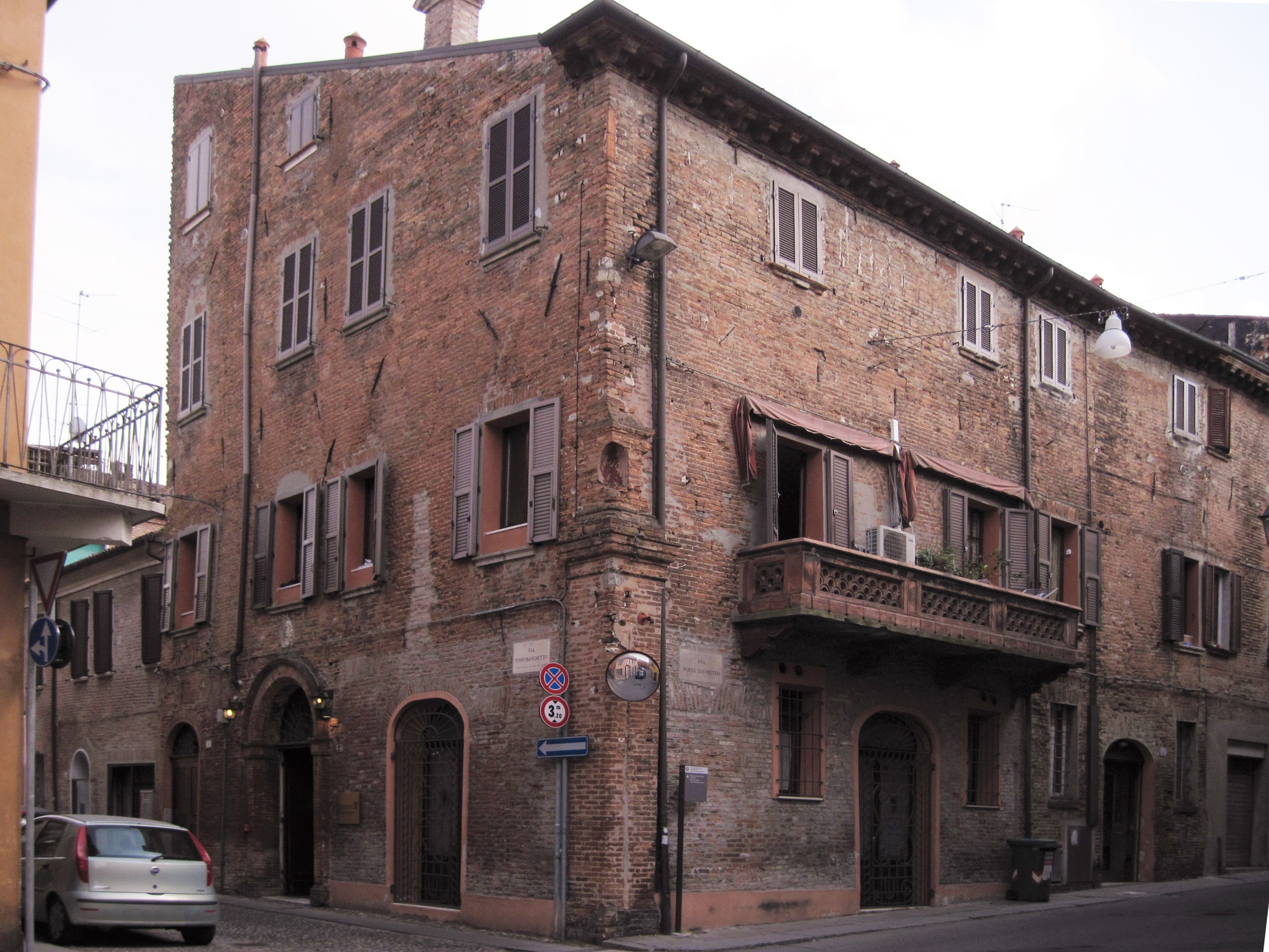 edificio tipico